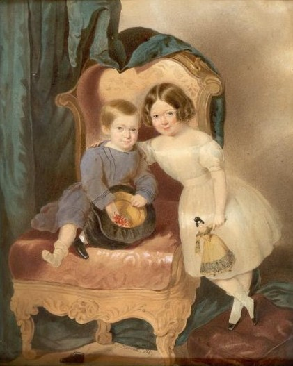 Портрет Павла Яковлевича и Евгении Яковлевны Дашковых детьми